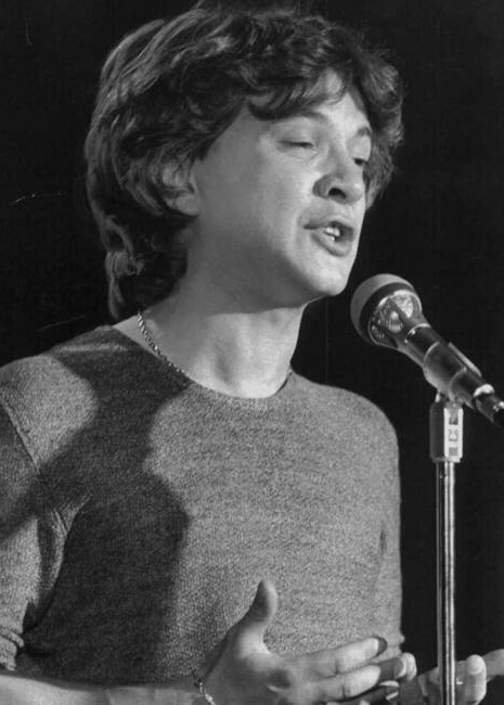 Pupo nel 1980 durante un concerto